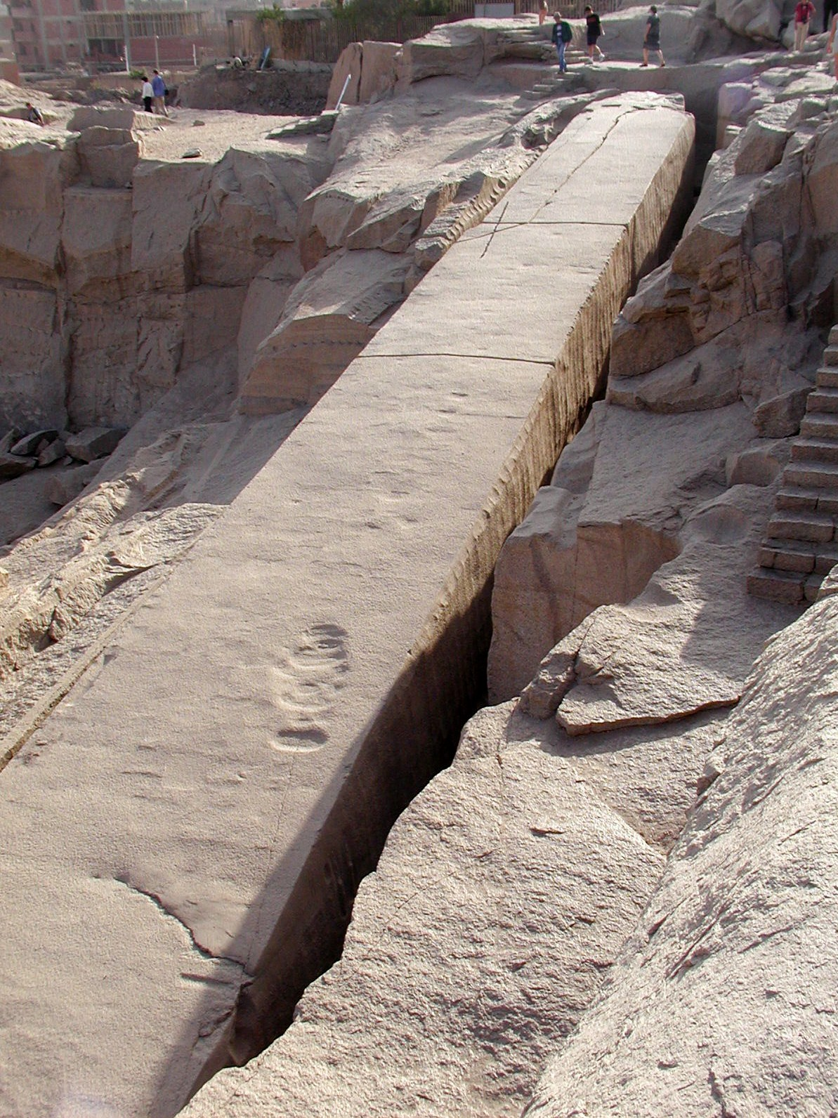 El obelisco inacabado, en la cantera de Asuán, Egipto.